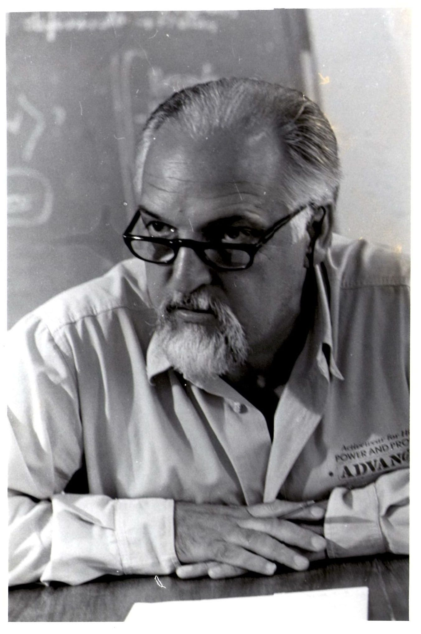 Foto de Cezar Rodrigues Campos